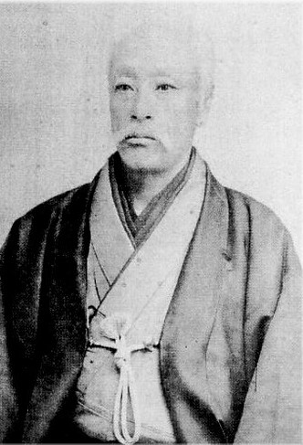 伊達宗徳の肖像写真。